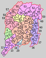 愛知県碧海郡の町村制時点の町村。